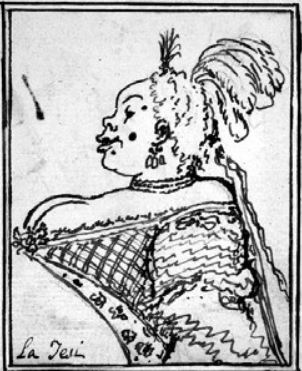 Si tratta di una caricatura (penna e inchiostro bruno su traccia di matita nera; Venezia, Fondazione Giorgio Cini, 36620). del contralto Vittoria Tesi Tramontini, realizzata da Anton Maria Zanetti nel 1741 (secondo la data annotata manualmente nella copia in possesso del Royal Collection Trust, come più oltre specificato). Come di consueto, Zanetti mette in evidenza i caratteri fisici (labbra grandi, naso camuso) che ricordano le ascendenze africane della cantante